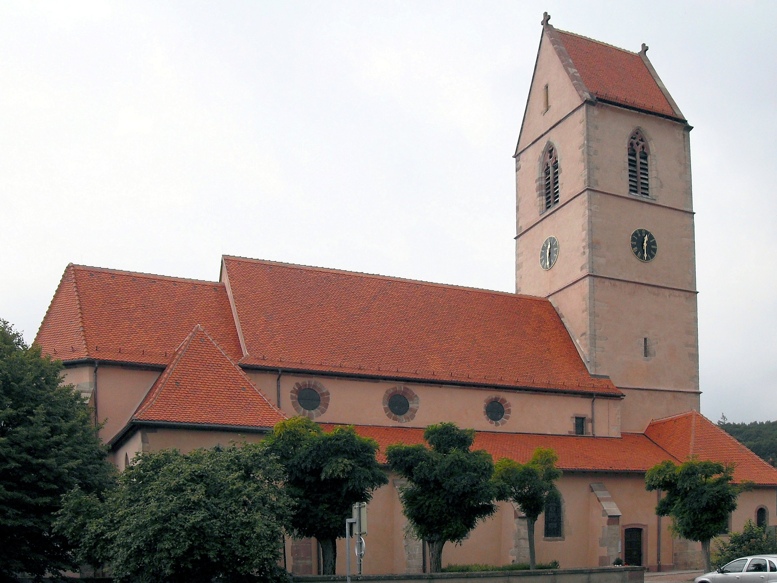 L'église Saint-Jean-Baptiste à Wattwiller